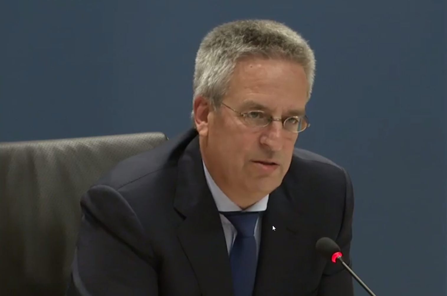 Marc Calon (Breskens, 18 januari 1959) is een Nederlands politicus en agrariër. Calon was jarenlang gedeputeerde in de provincie Groningen voor de PvdA. Sinds 2009 is hij voorzitter van de koepel van woningbouwcorporaties Aedes.